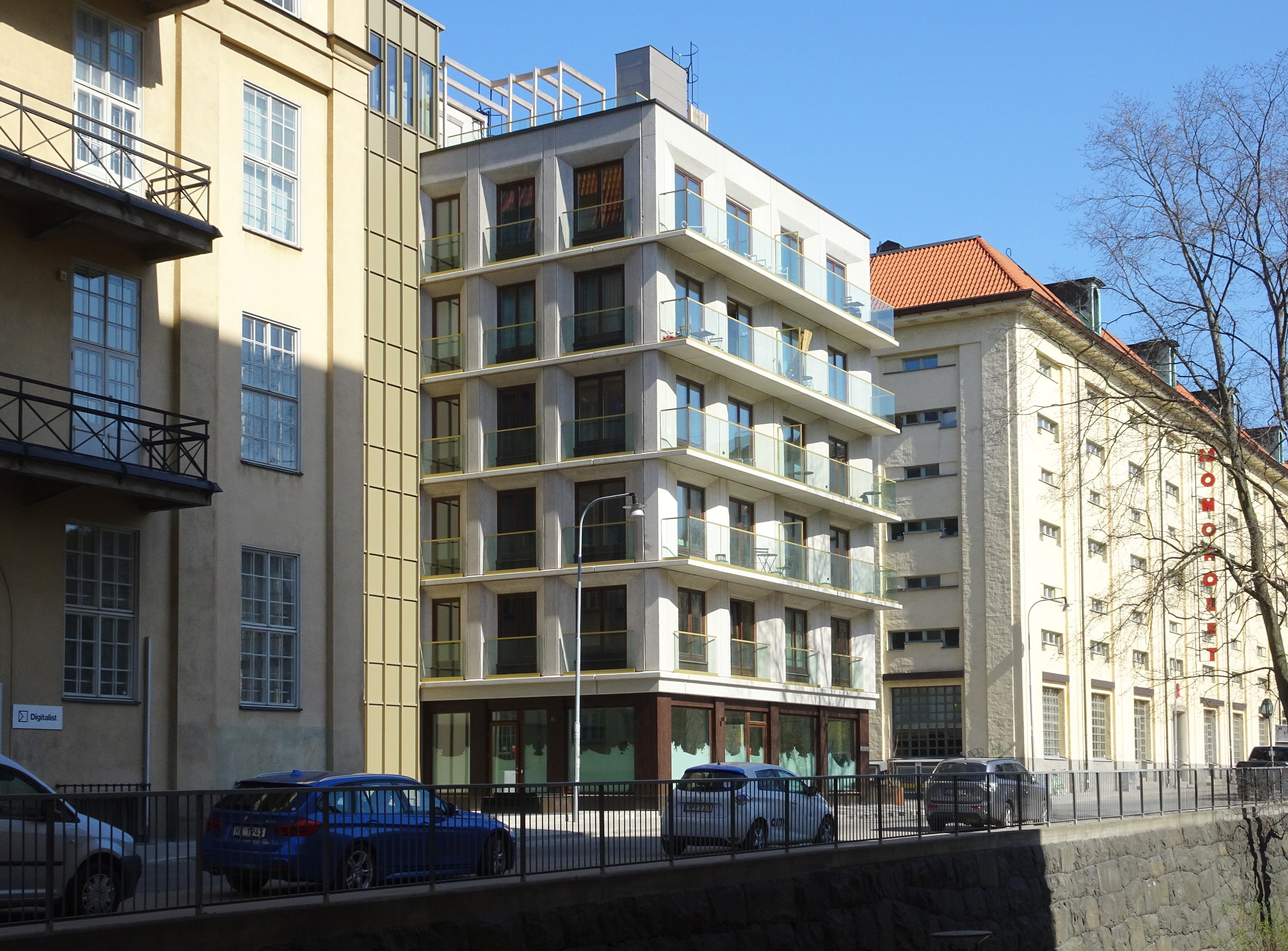 Flerbostadshus "Mono". Fastighet: Tobaksmonopolet 9 Adress: Maria Bangata 2B